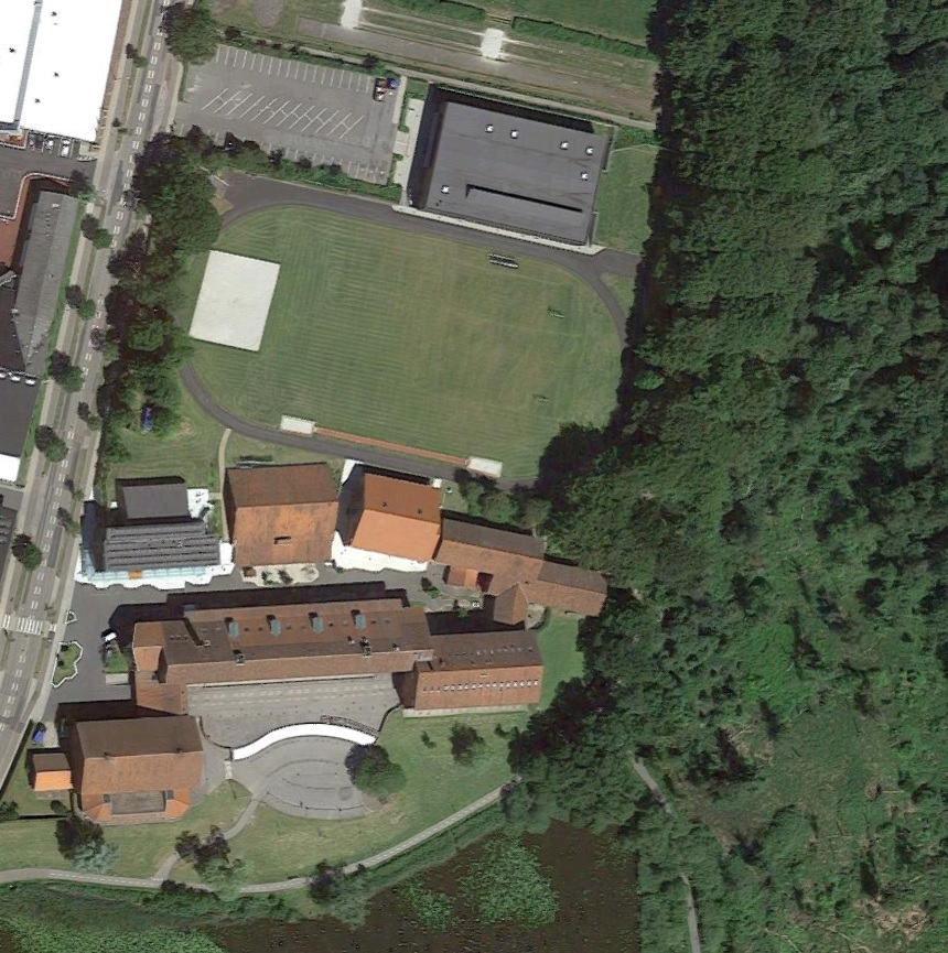 Overblik og gymnasiet